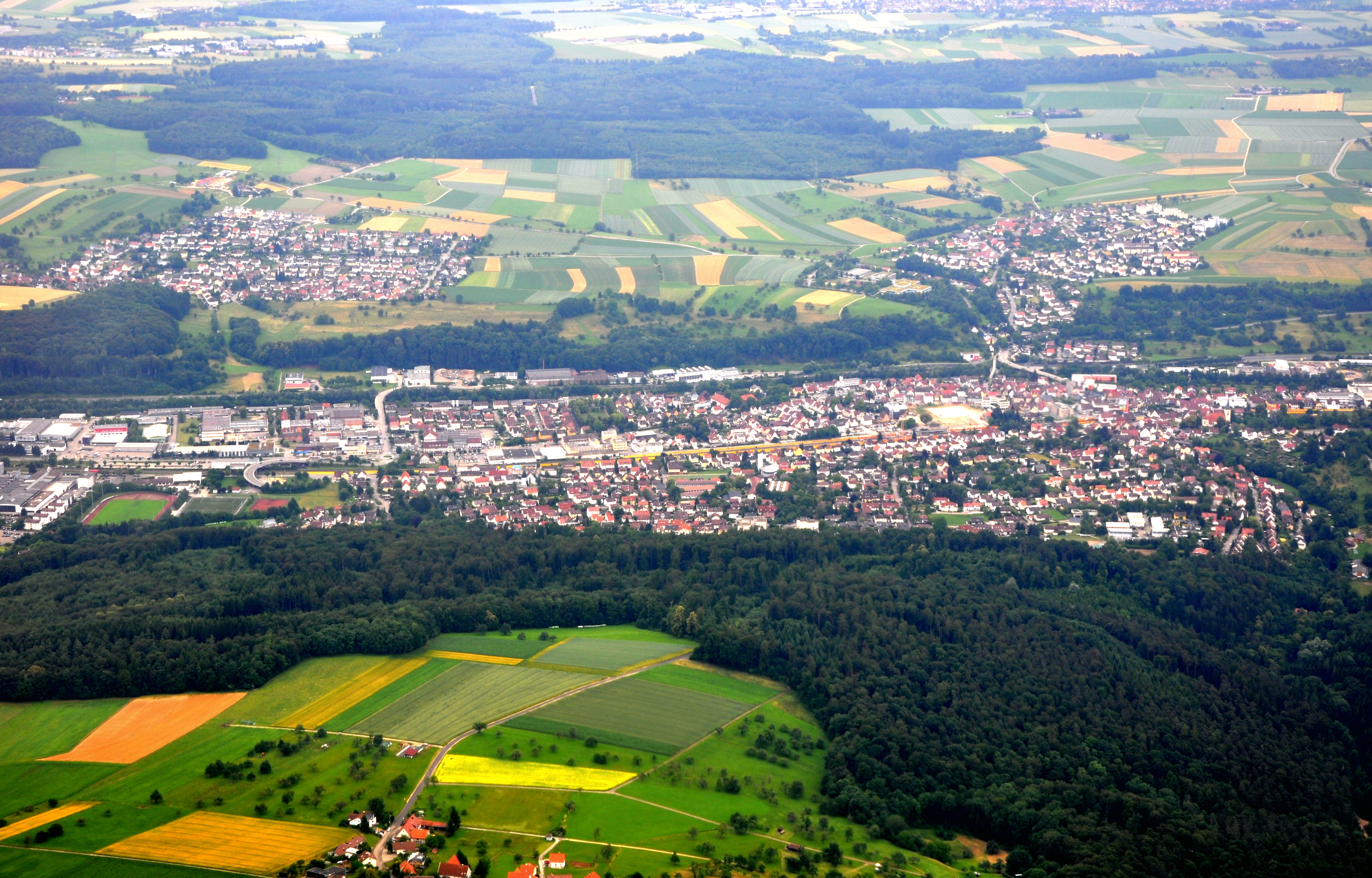 Ebersbach an der Fils, Luftbild